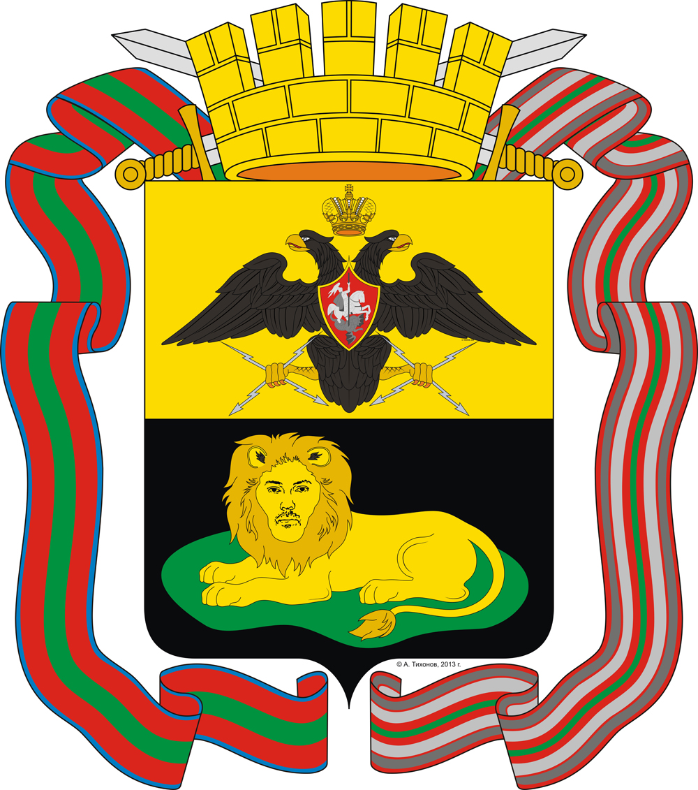 Герб города Бендеры с орденскими лентами и городской короной с мечами